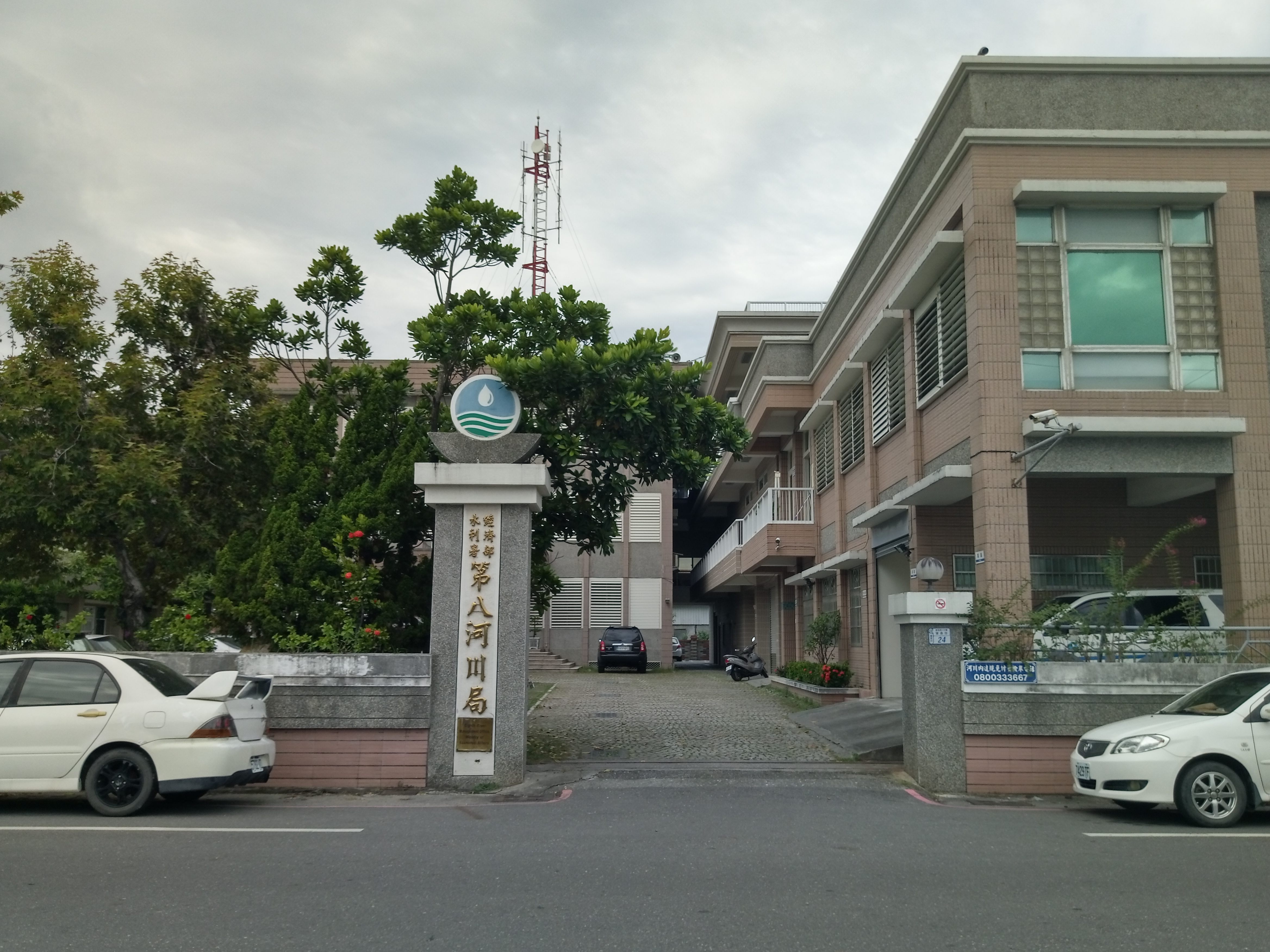 經濟部水利署第八河川局大門